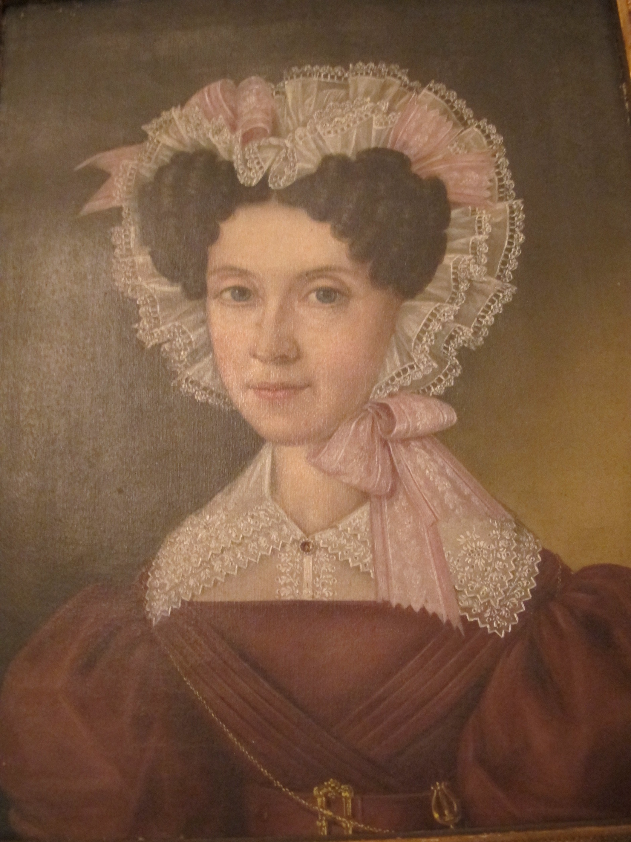 Caroline Mathilde Hysing